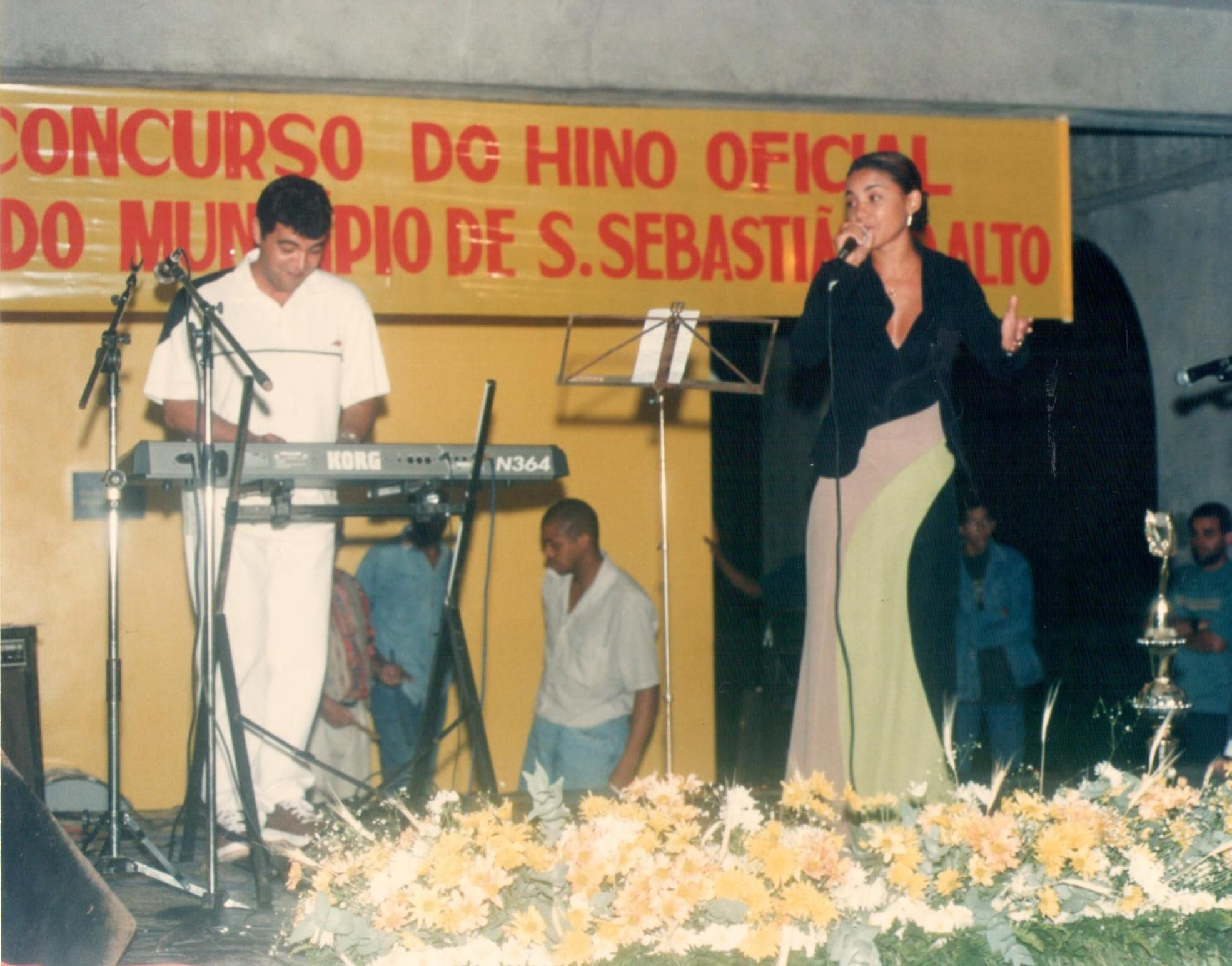 Apresentação da melodia vencedora do Concuro do Hino Oficial do Município de São Sebastião do Alto, em 27 de março de 1998. O compositor Marcelo Romeiro Juliano e a intérprete Raquel Carvalhães. O evento foi realizado no Ciep-274 Maria Amélia Daflon Ferro, em São Sebastião do Alto-RJ